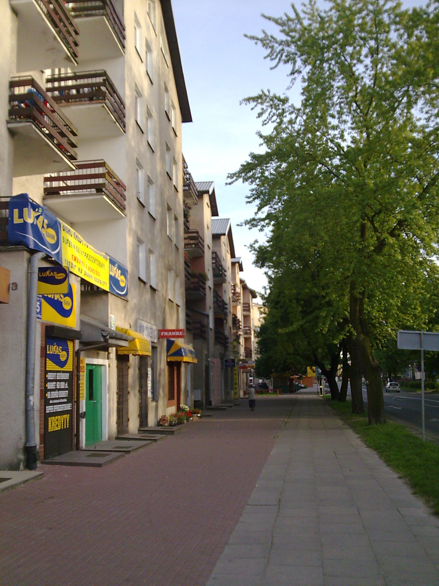 Zabudowa przy ulicy 3 Maja w Ostrowi Mazowieckiej